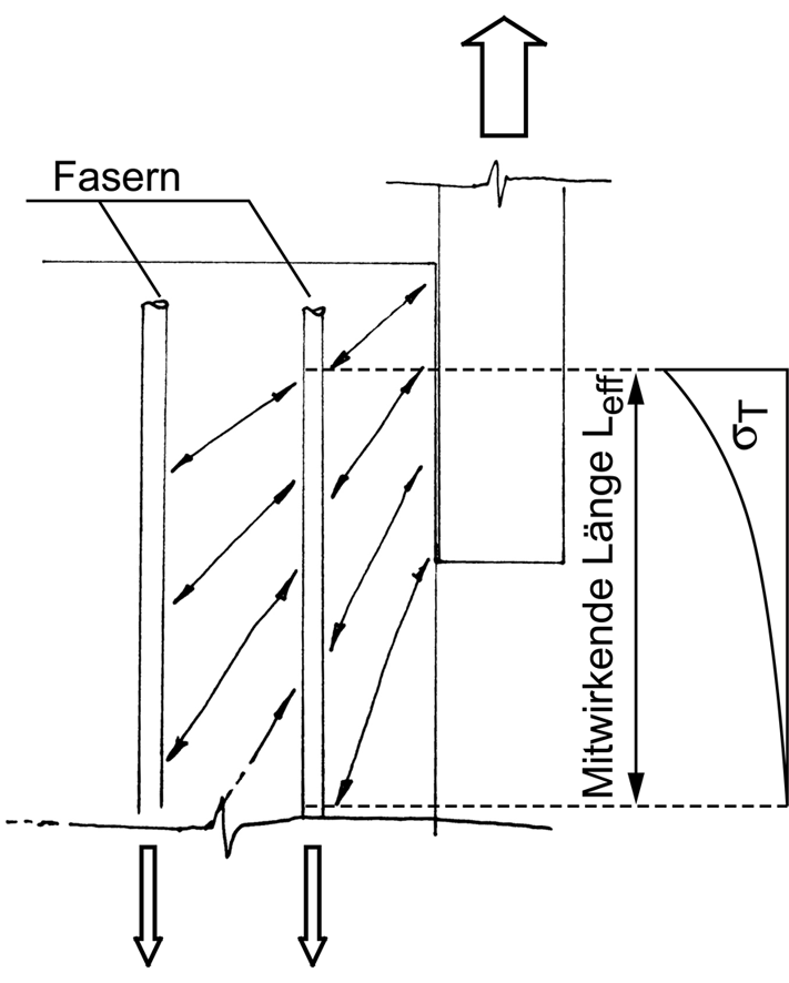 Veranschaulichung der Spannungsübertragung in Faserverbundwerkstoffen für den Lastfall Zug. Version: 1